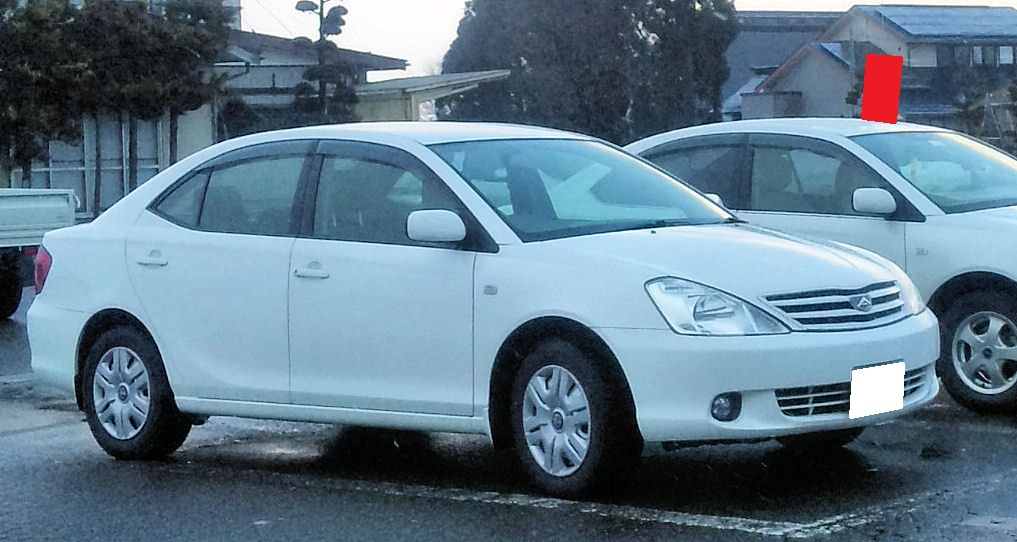 トヨタ・アリオン